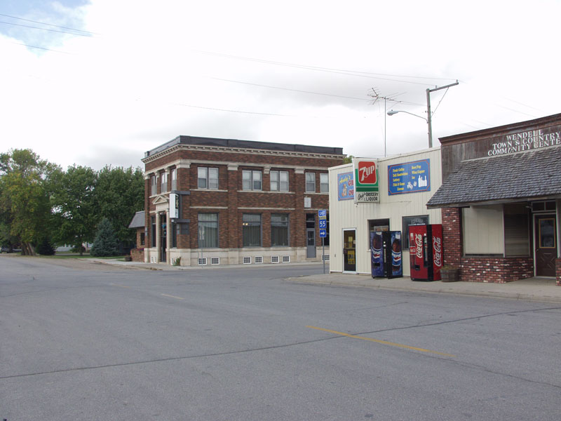 Wendell, Minnesota. From .